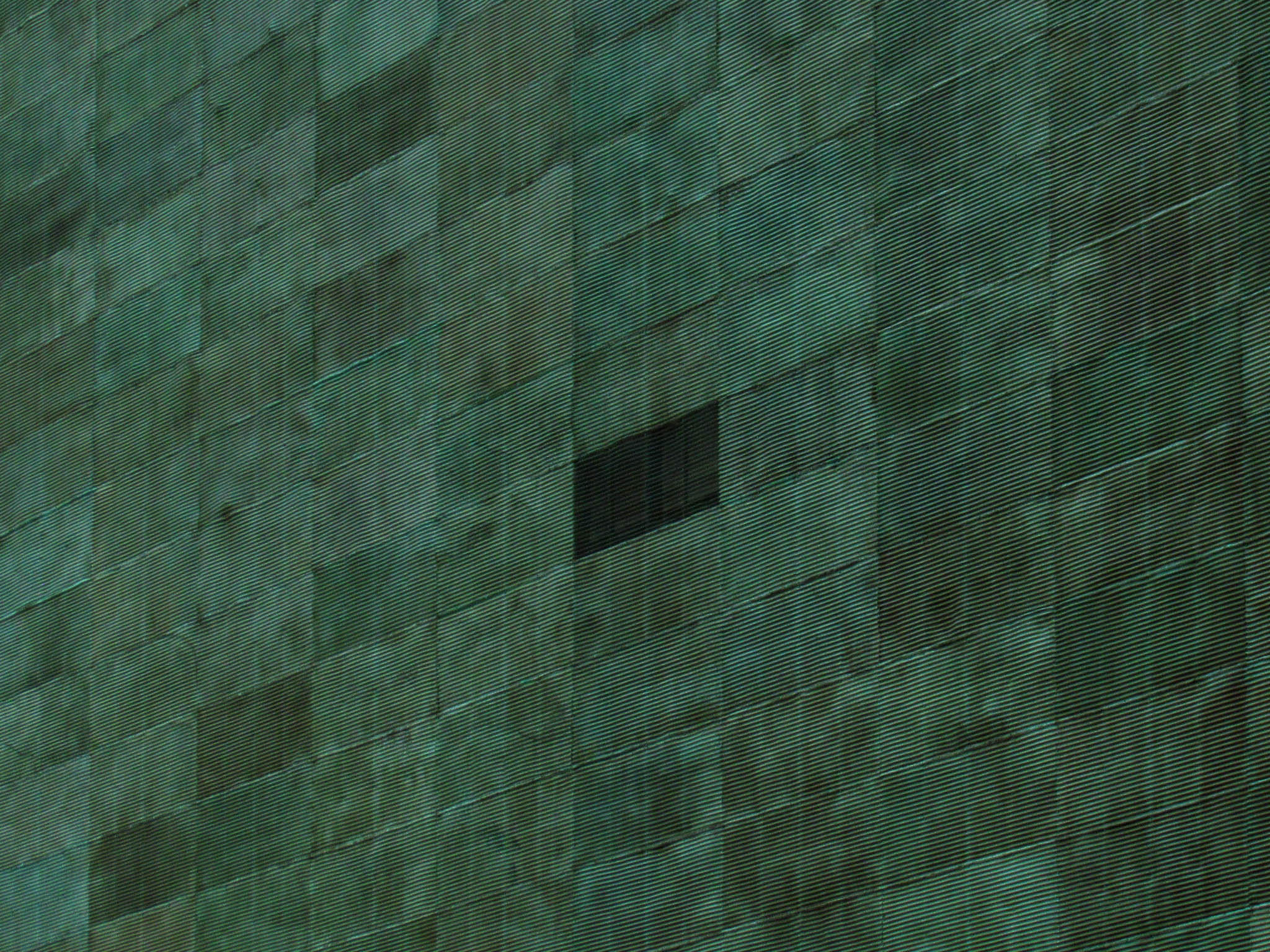 Memoria